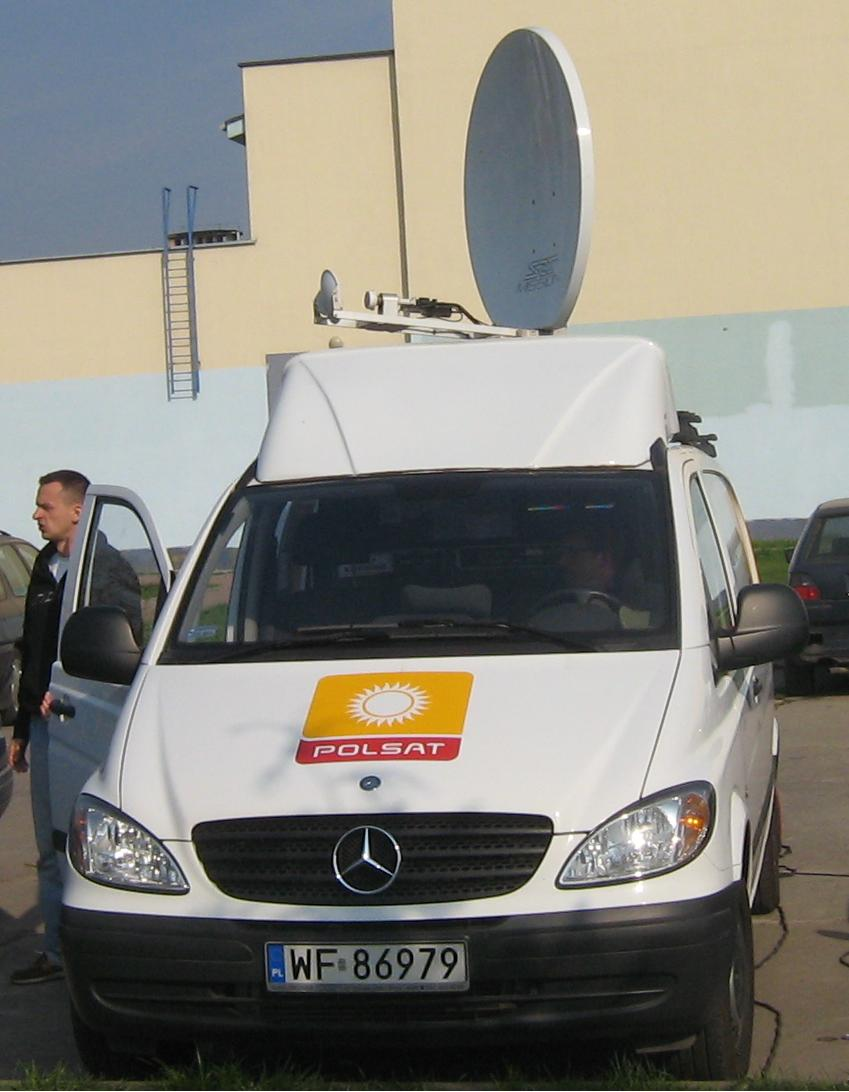 Mercedes-Benz Vito II w Kamieniu Pomorskim.